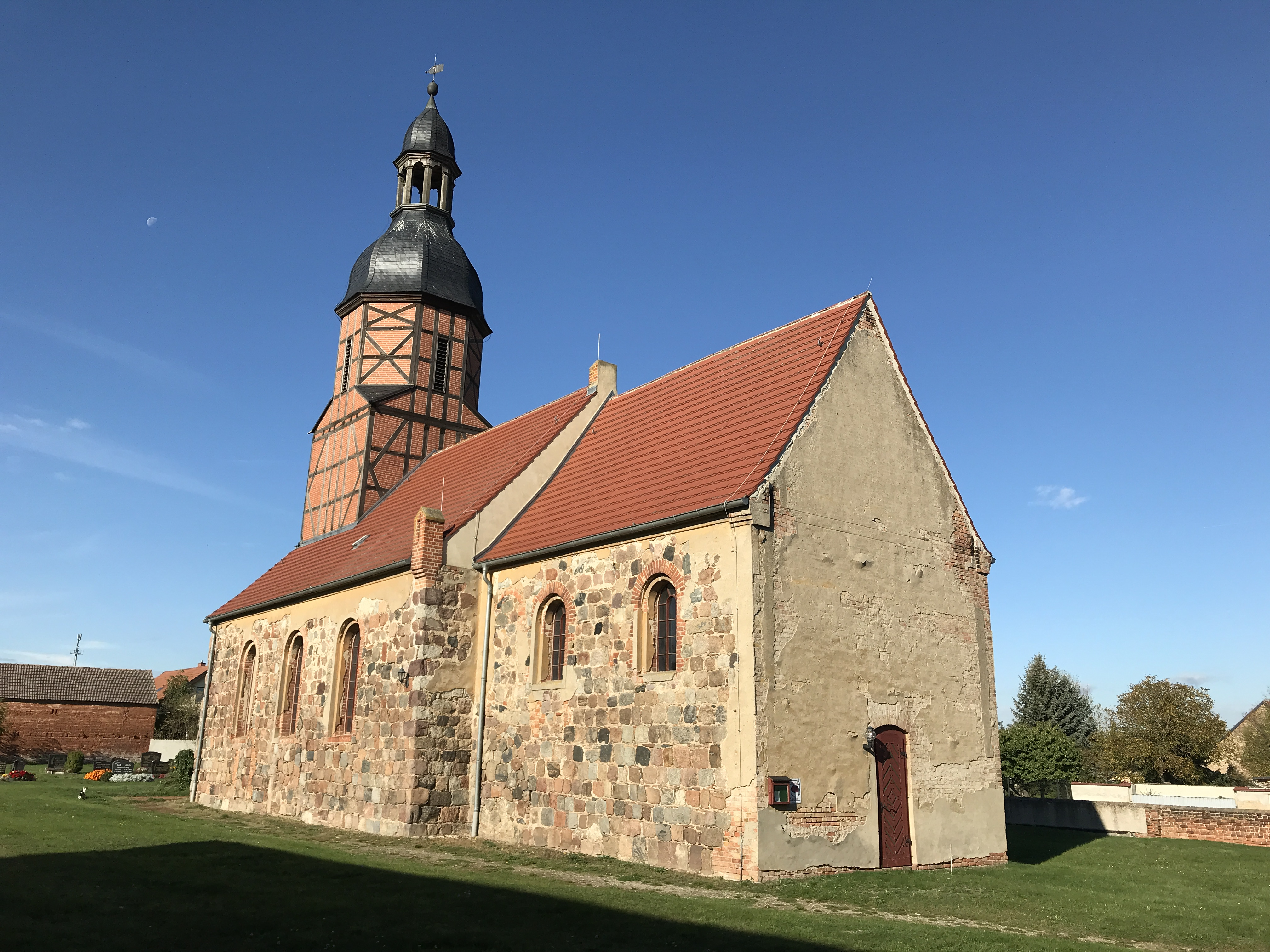 Die Dorfkirche Welsickendorf in der Gemeinde Niederer Fläming im Landkreis Teltow Fläming ist eine Feldsteinkirche aus dem 13. oder 14. Jahrhundert. Im Innern steht unter anderem ein breiter Altaraufsatz aus dem Jahr 1692.